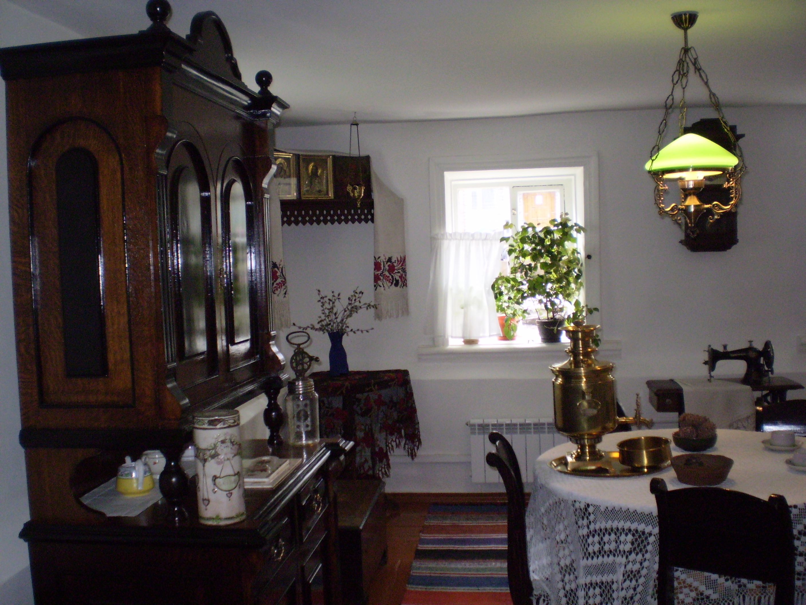 Усадьба Суриковых в Красноярске. Кухня.